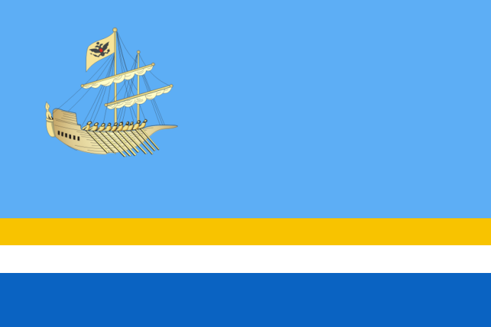 Флаг Костромы, Россия.